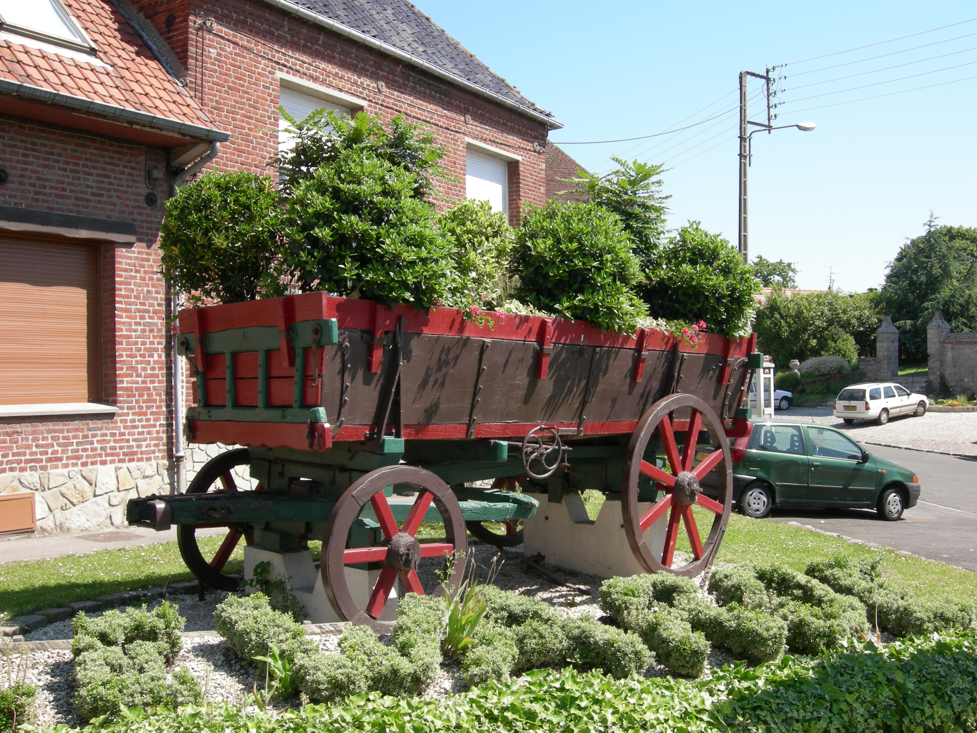 Entrée de Lewarde.